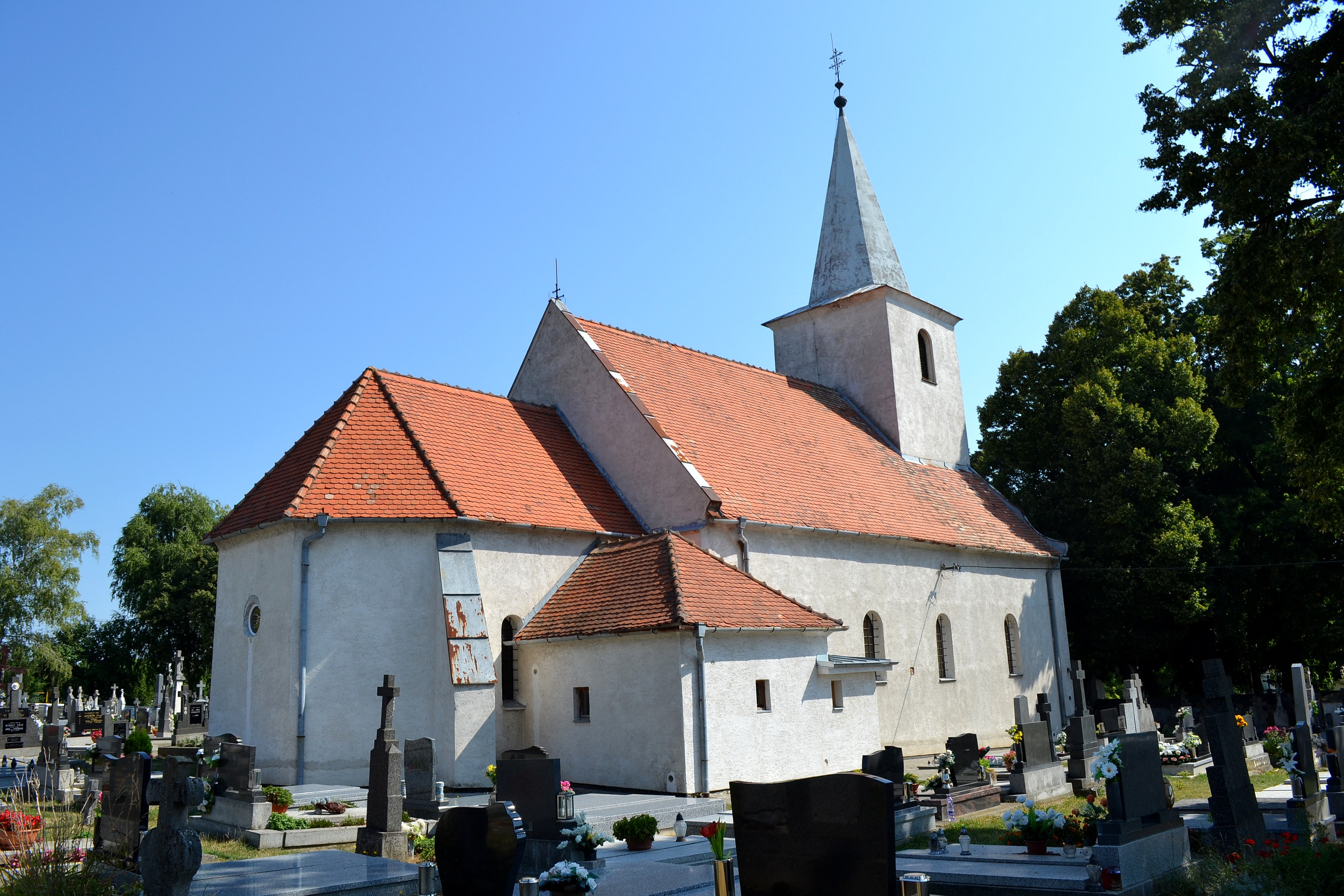 Kátlovce (okr. Trnava), Kostol svätého Ducha; celkový pohľad